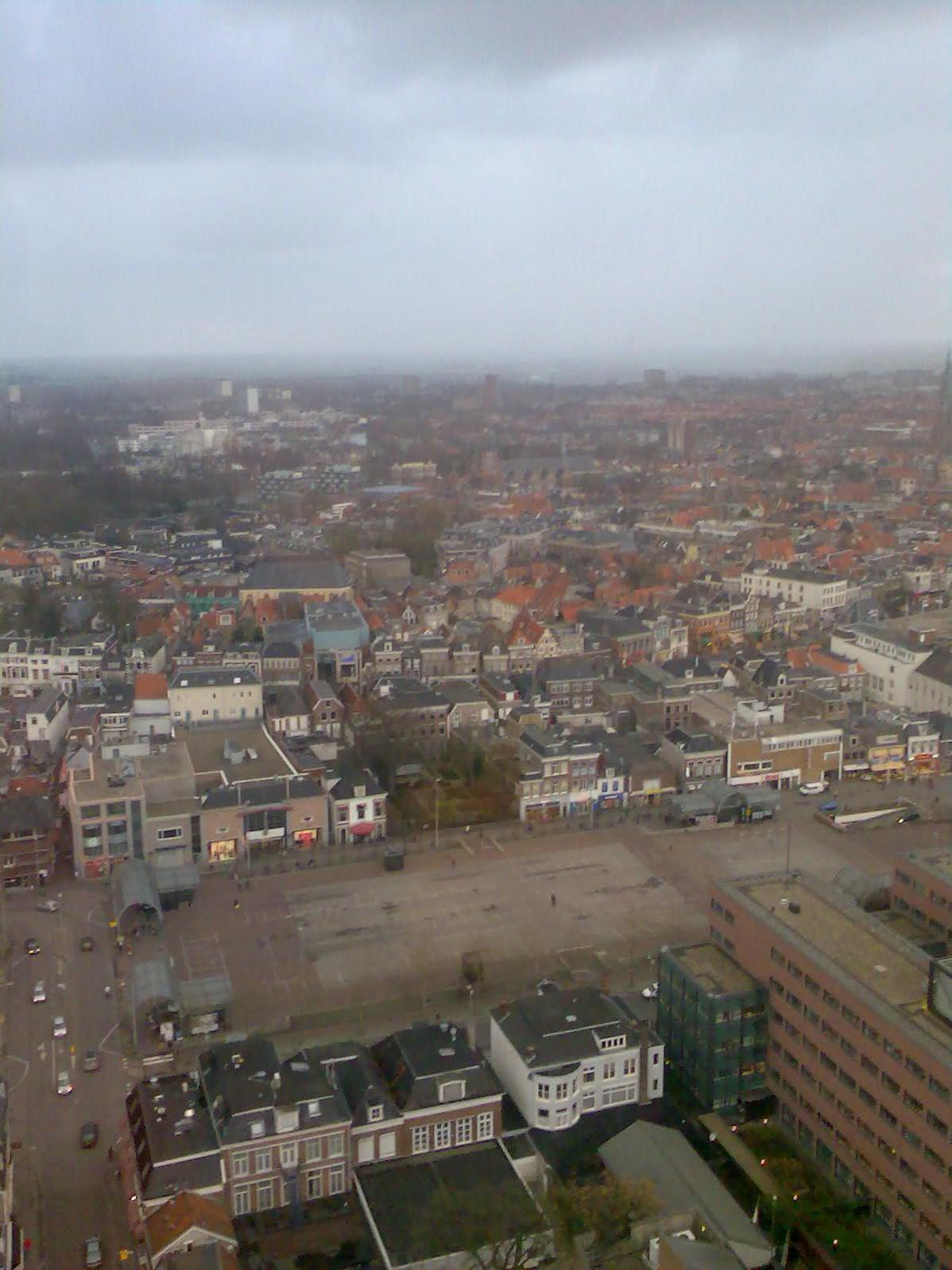 PD door eigen werk